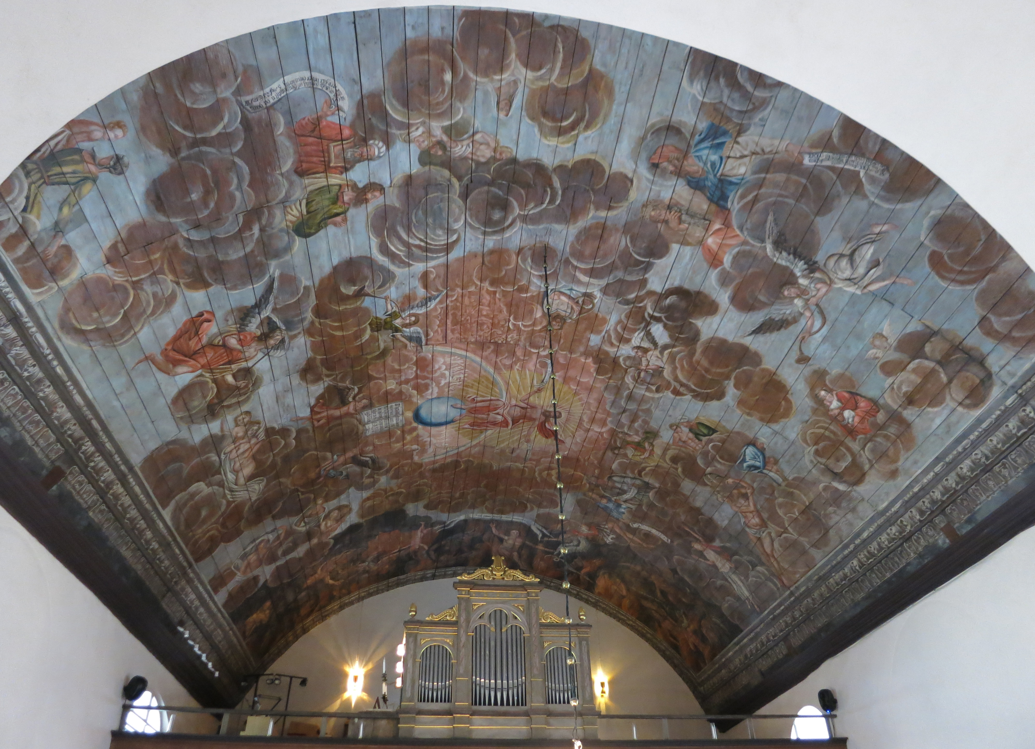 Naverstads kyrka, Bohuslän Takmålning i långhuset av Christian von Schönfeldt.